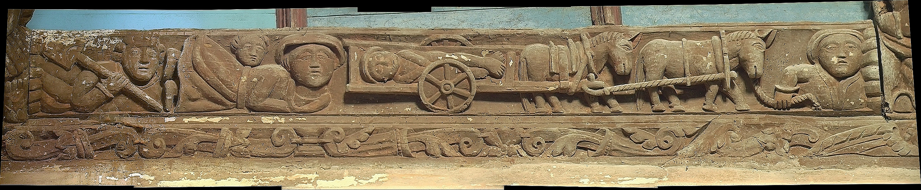 La Roche-Maurice (Bretagne, Finistère) Eglise Saint-Yves, geschnitzte Trauffette